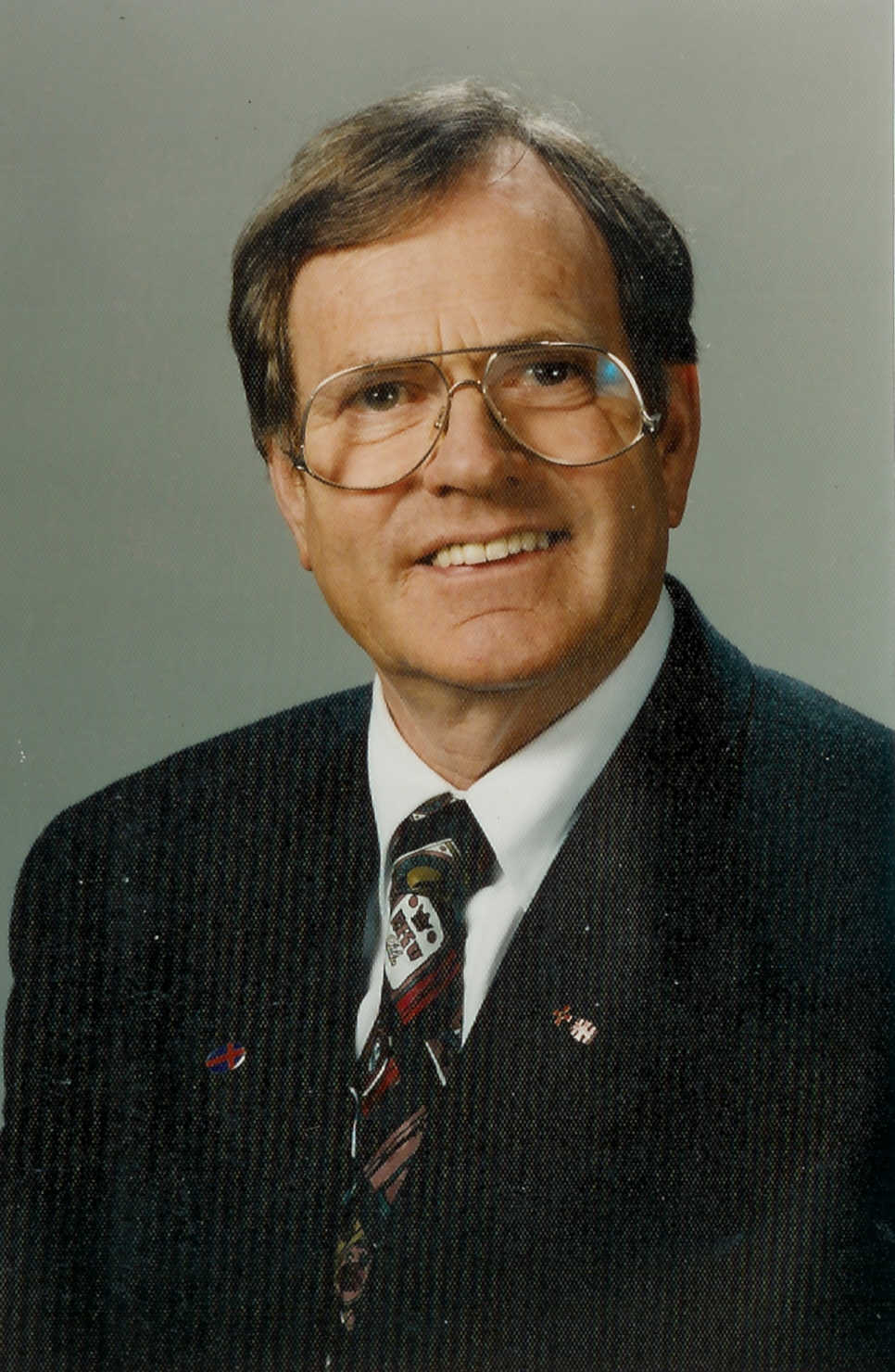 Eilert Tantzen, deutscher Forstmann, Politiker und Heimatforscher im Jahr 1992.